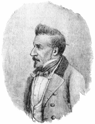 Luigi Chitti - Riproduzione di uno schizzo a penna fatto dall'artista Debar